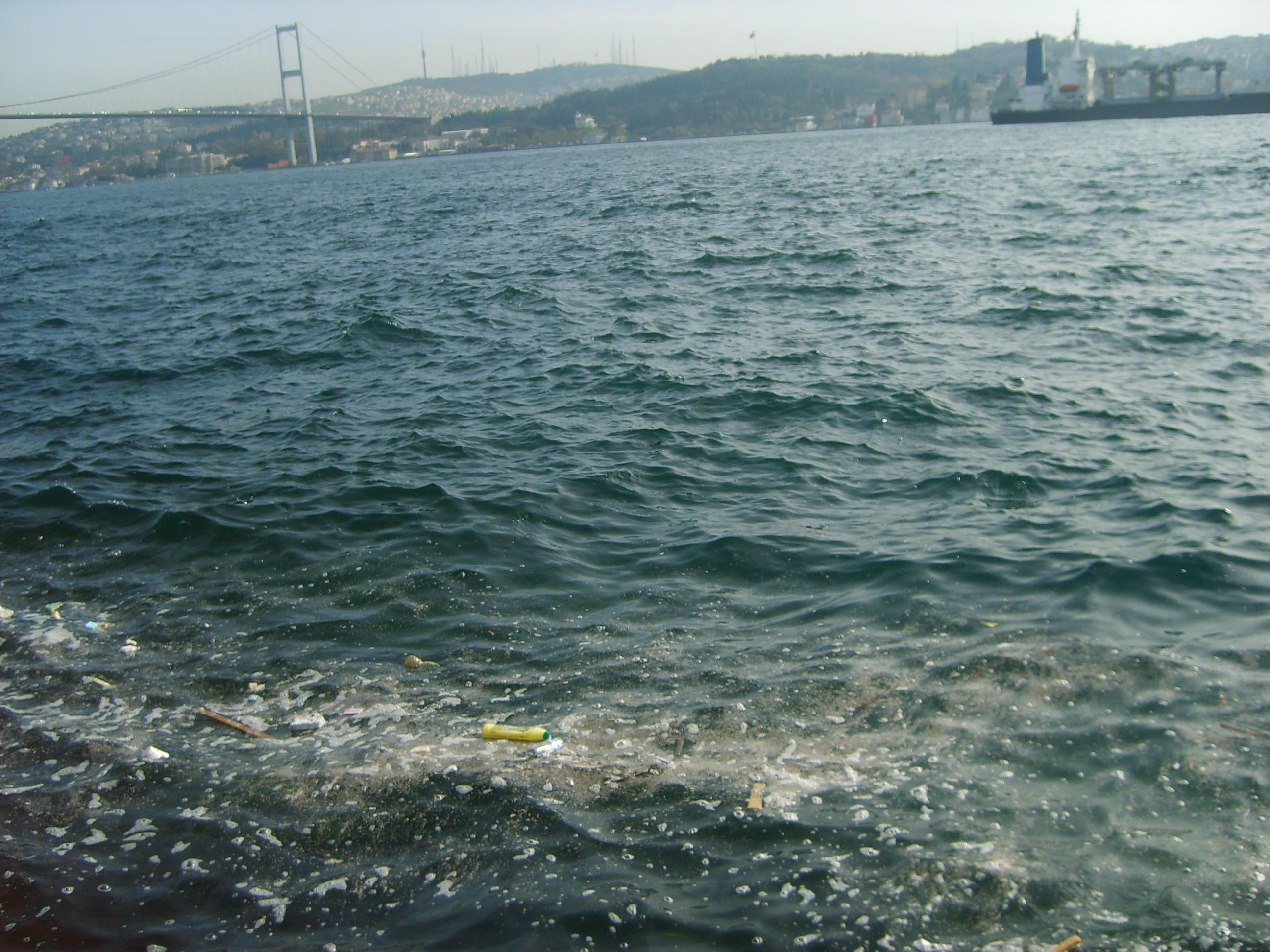 İstanbul Boğazı'nda kıyıya vuran çöpler